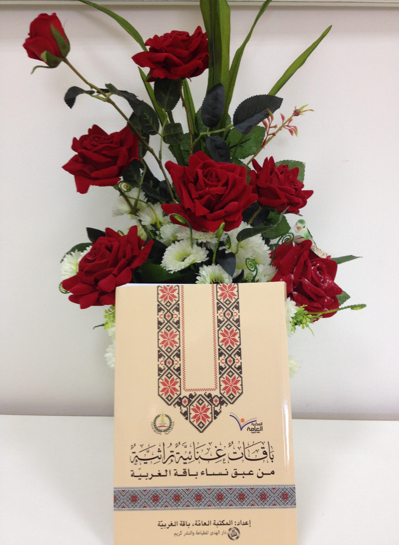 ספר השירים הפולקלוריים הערביים ששרים בחתונות, יצא לאור ע"י הספרייה העירונית באקה אלגרבייה